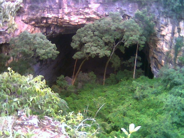 Buraco das Araras